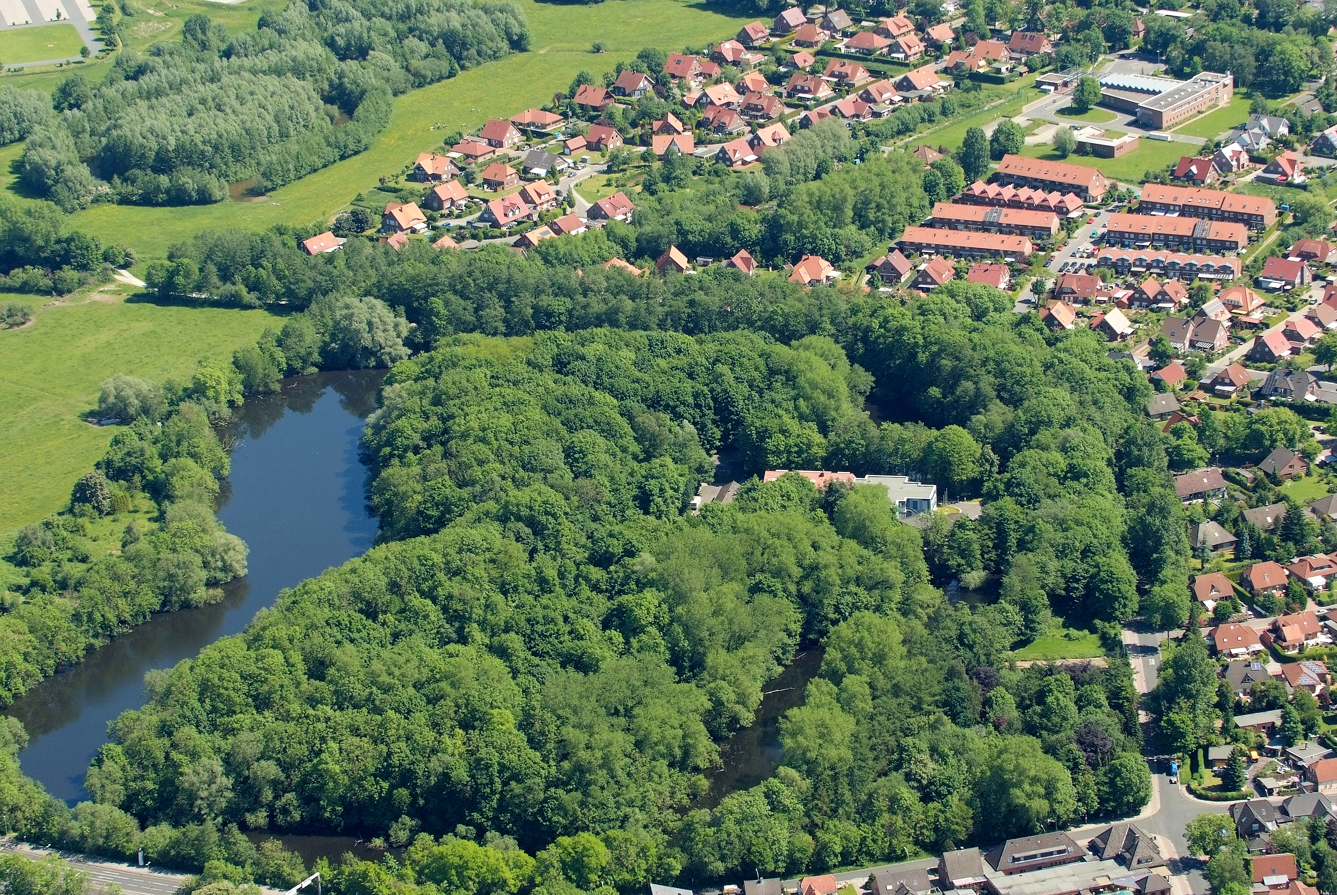 Fotoflug vom Flugplatz Nordholz-Spieka über Cuxhaven und Wilhelmshaven Hier zu sehen: Ehemaliges Fort Rüstersiel mit Fortgraben (jetzige Vogelwarte Helgoland), von Südwesten aus gesehen. Die Wohnhäuser gehören zum Wilhelmshavener Stadtteil Rüstersiel.